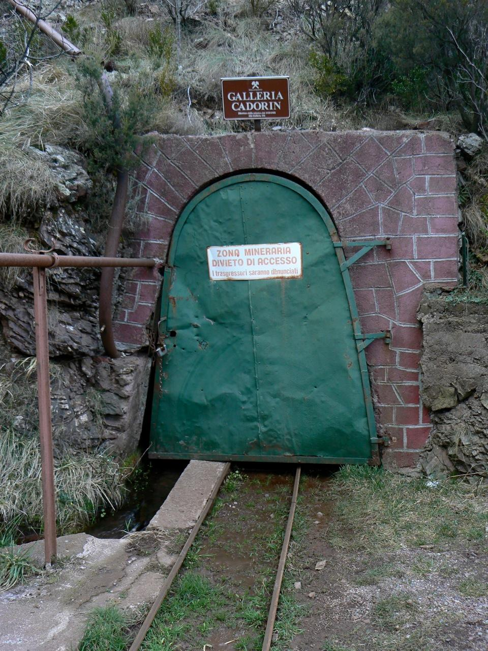 Manganese Mine, still operational - in Liguria, Italy, near Lavagna